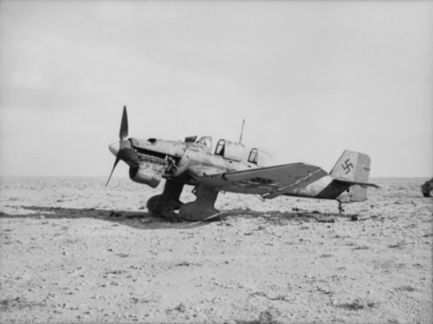 A damaged German Junkers Ju 87B Stuka at Acroma, Libya, in 1941.